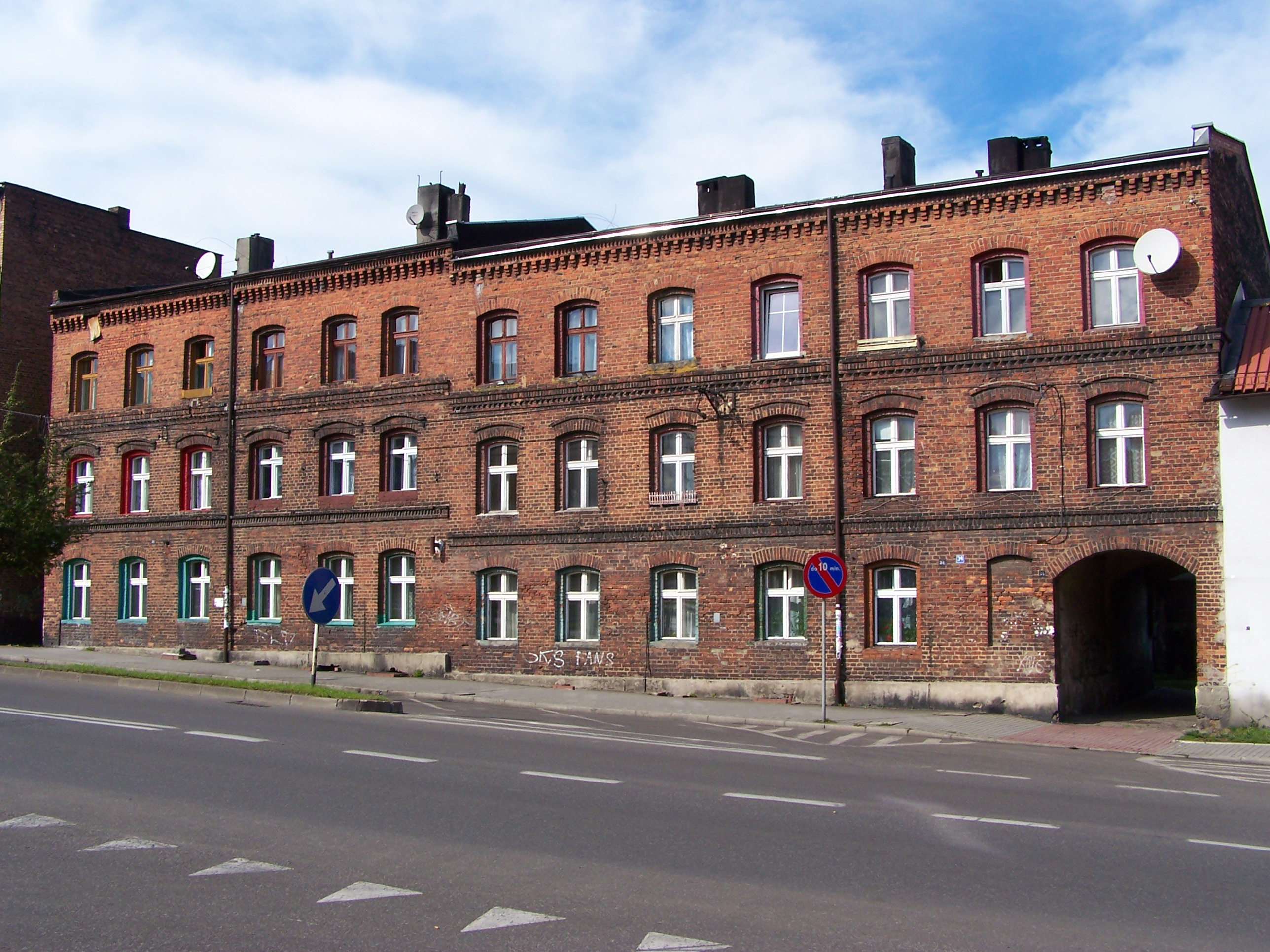 Familoki przy ulicy Katowickiej w Katowicach-Bogucicach.